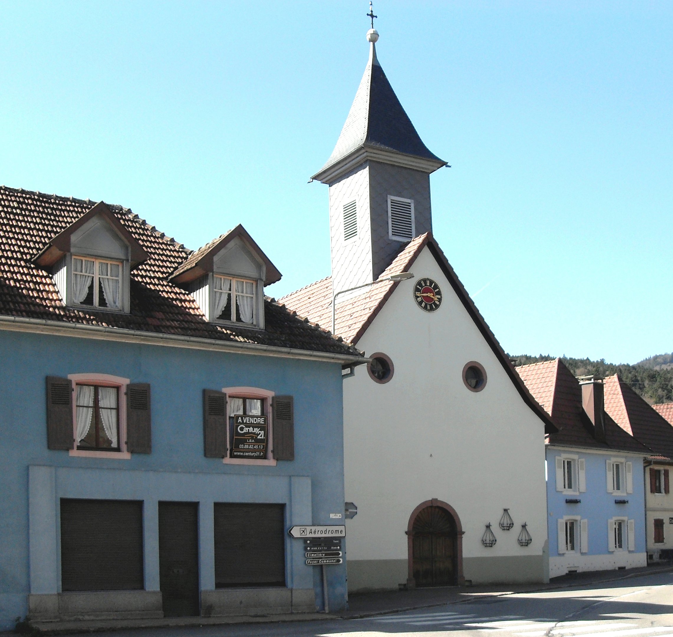 L'église Saint-Antoine-de-Padoue d'Oberbruck